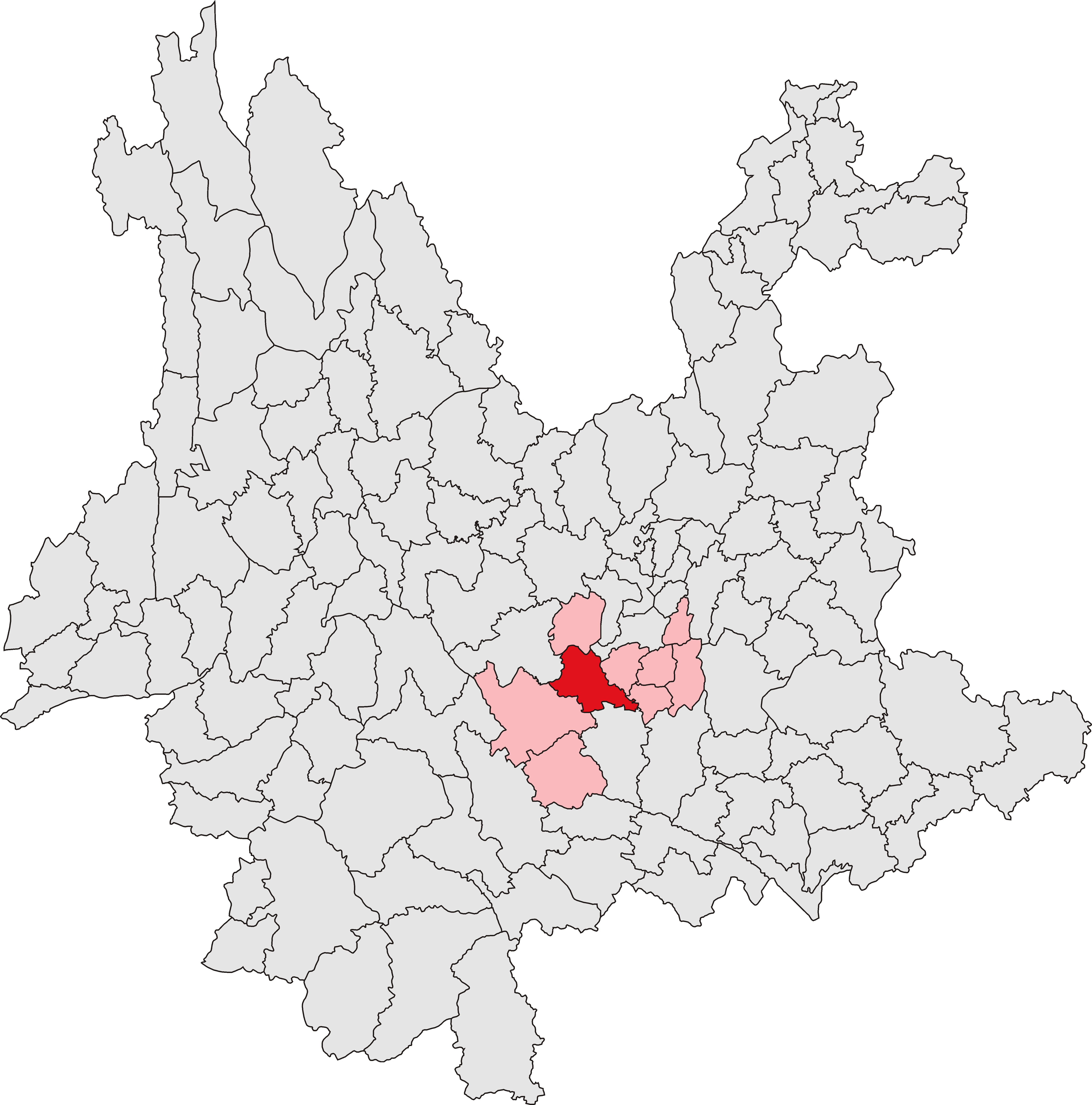 中文（中国大陆）: 峨山彝族自治县位置图